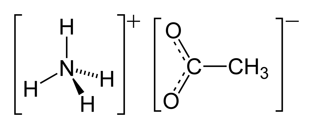 Structural formula of ammonium acetate, [NH4][CH3CO2].